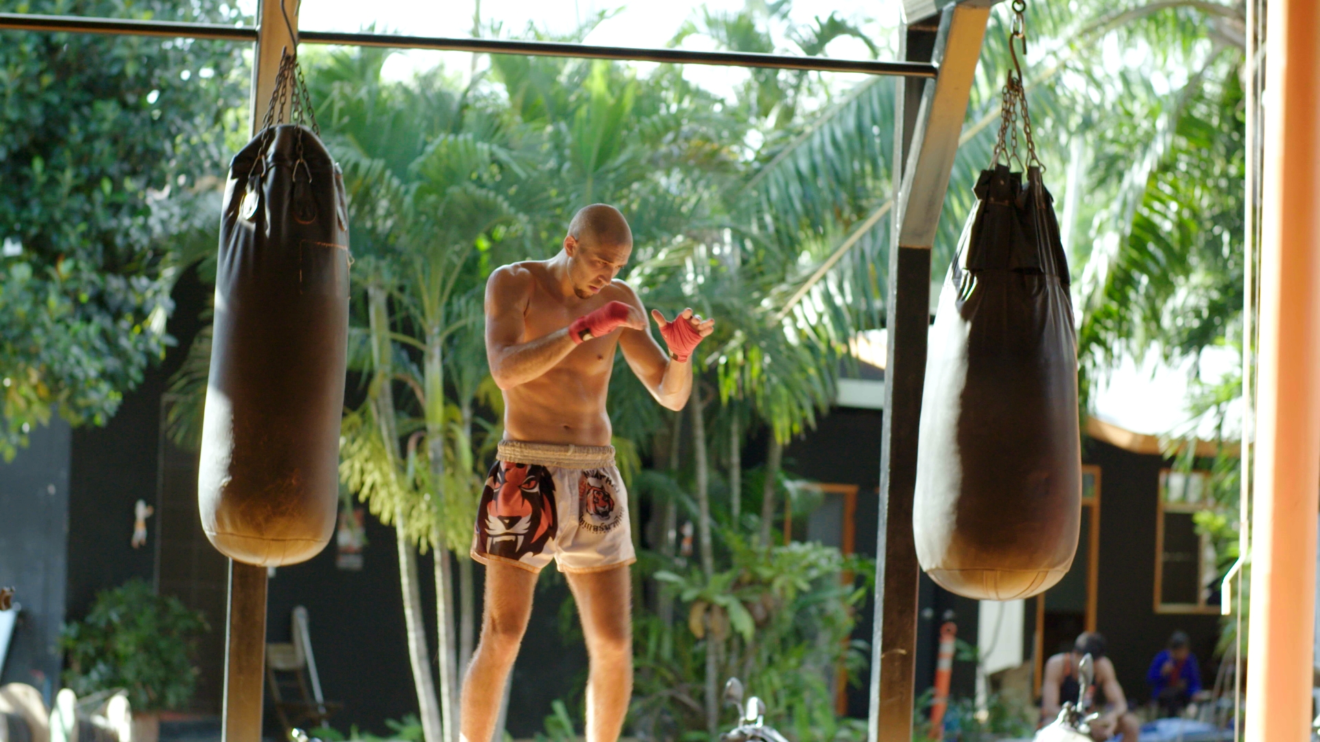 Photo issue du tournage du La Fosse aux Tigres